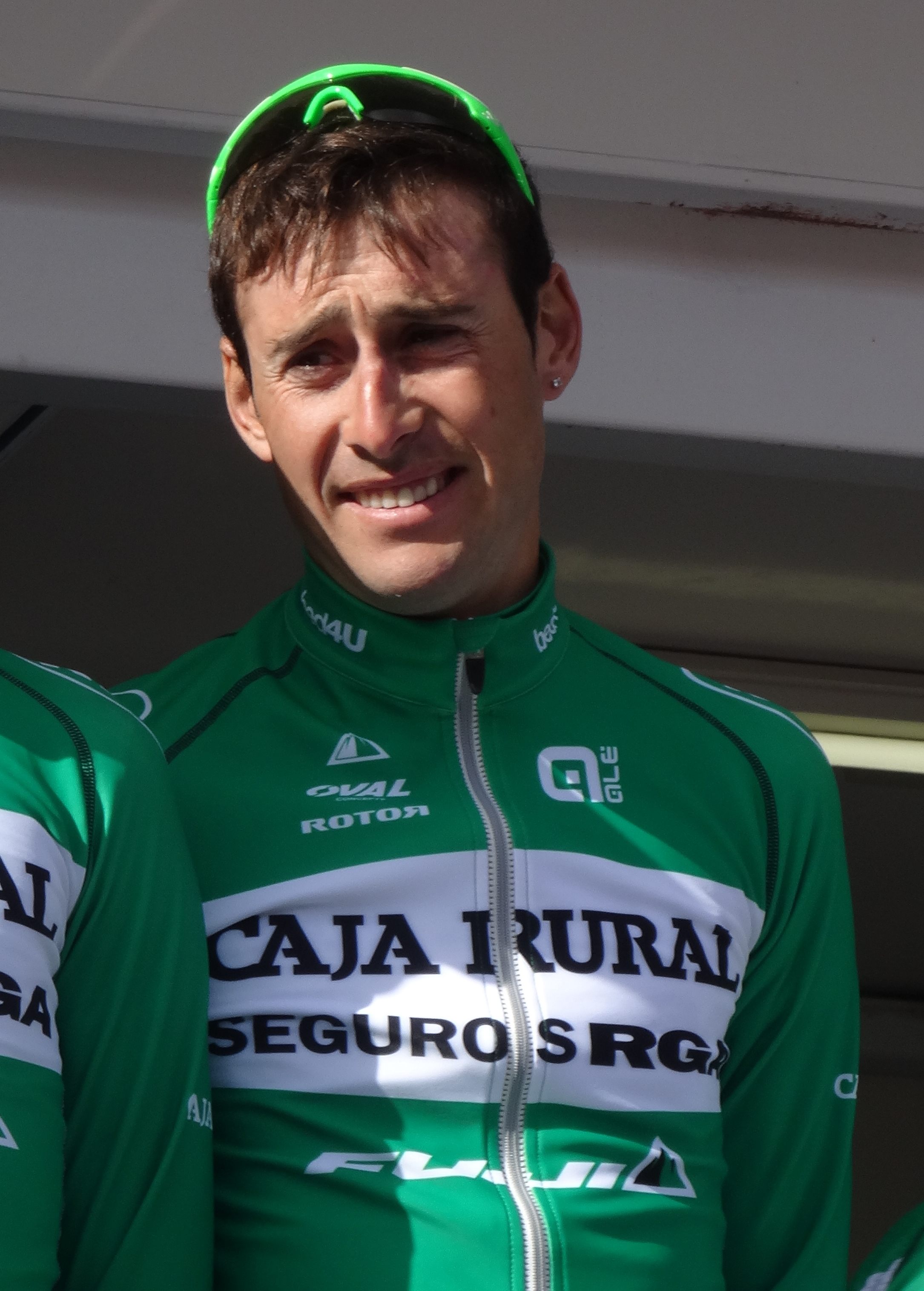 Reportage réalisé le mercredi 4 mars à l'occasion du départ du Samyn des Dames 2015 et du Samyn 2015 à Quaregnon, Belgique.